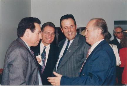 Deputados Federais_Rio Grande do Sul